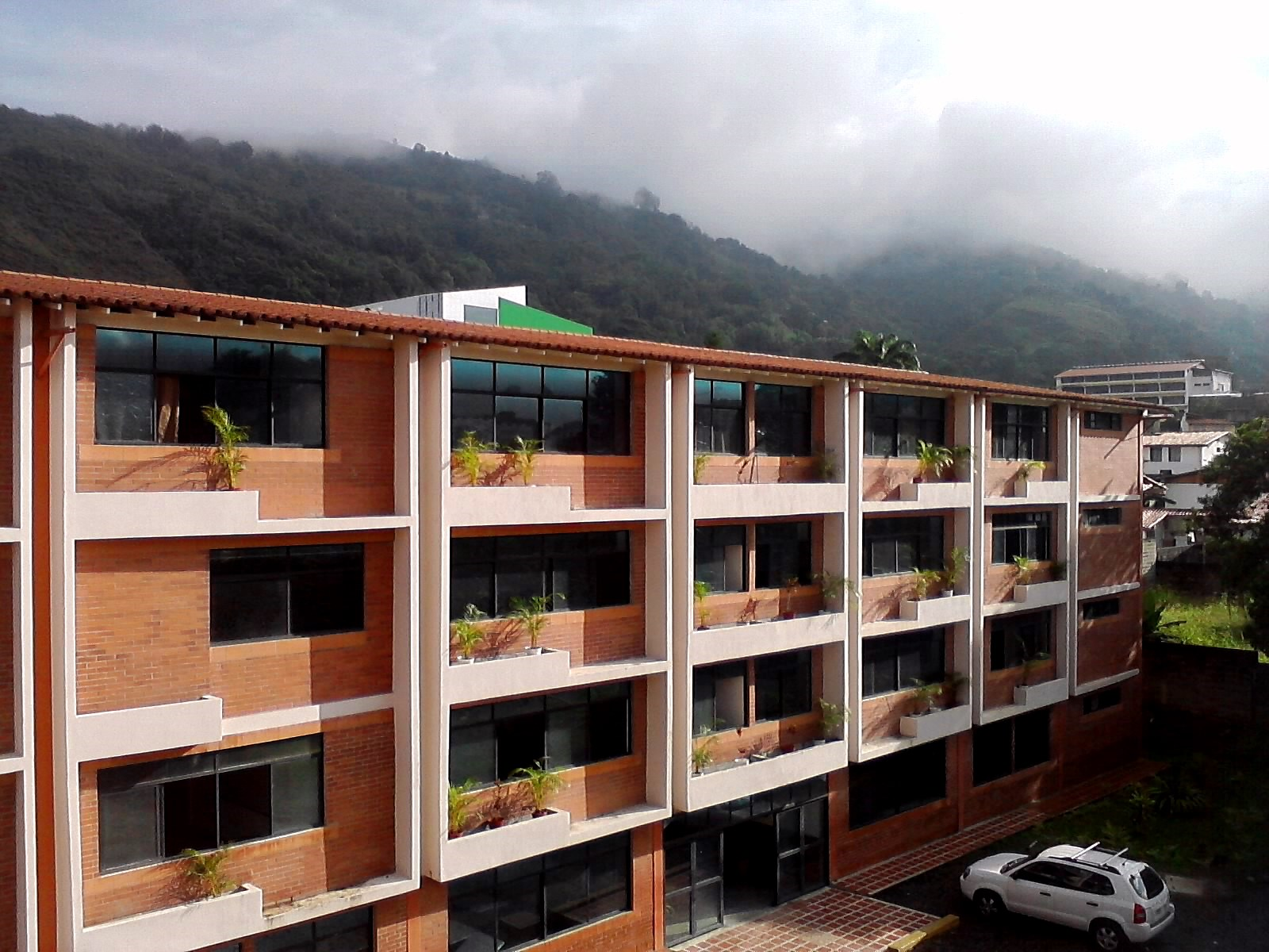 PSM Mérida